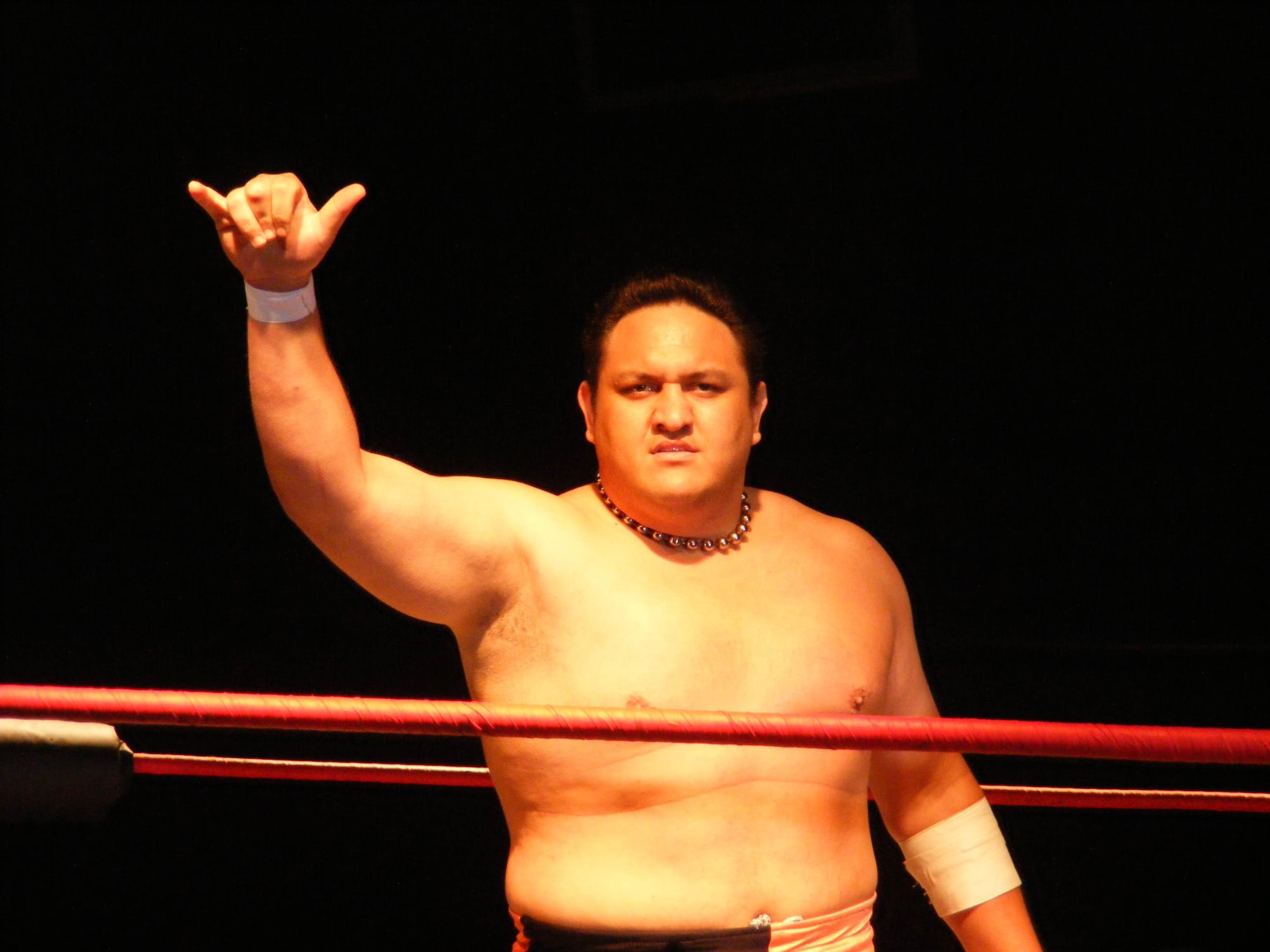 Que pasaaa?.